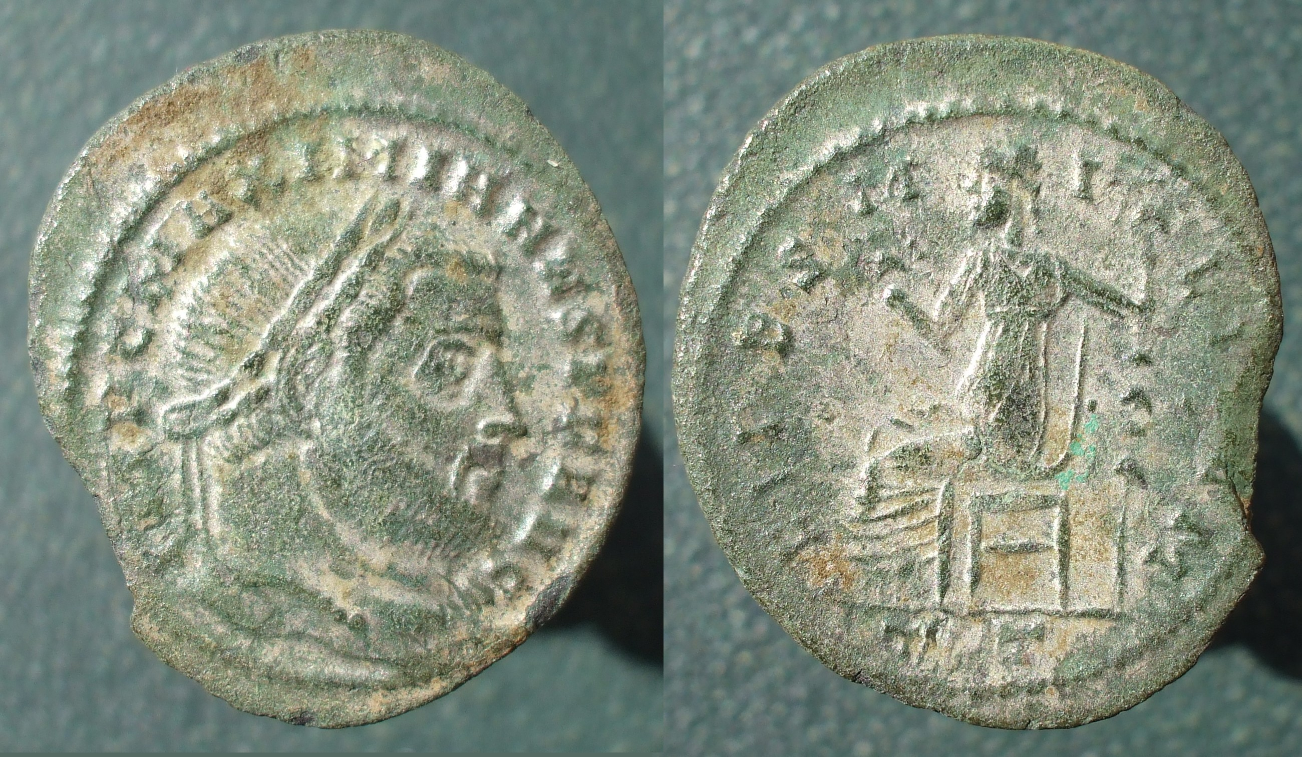 nummus, Maximien Galère, Fides Militum, Ticinum, Tétrachie